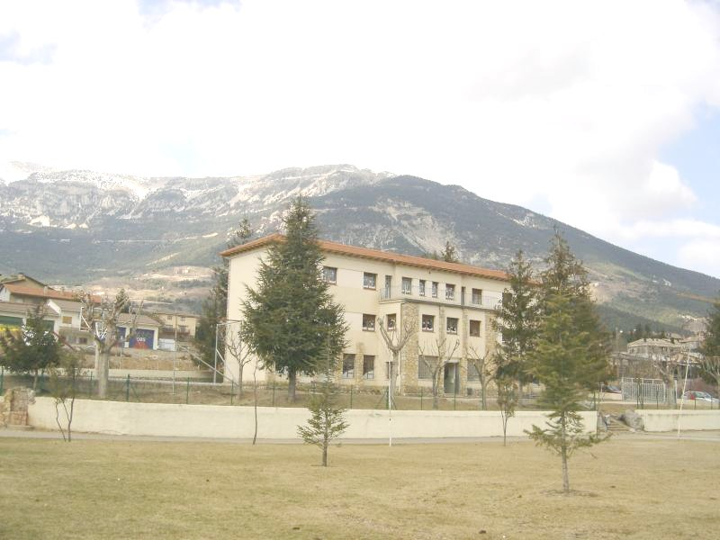 CEIP Vall de Lord, a Sant Llorenç de Morunys